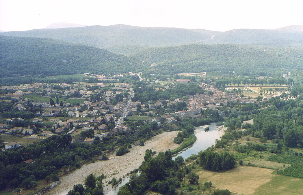 Description: Village de Saint-Bauzille-de-Putois, au bord du fleuve Hérault. Hérault, France. Source: Hugo Soria Licence: GFDL Hugo Soria